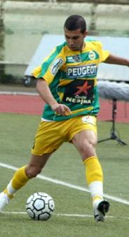 Photographie faite par Clapsus du joueur de la JS Kabylie Saâd Tedjar durant le match entre JS Kabylie et la JSM Béjaia dans le Stade du 1er novembre 1954 (Tizi-Ouzou) le 27 février 2010.